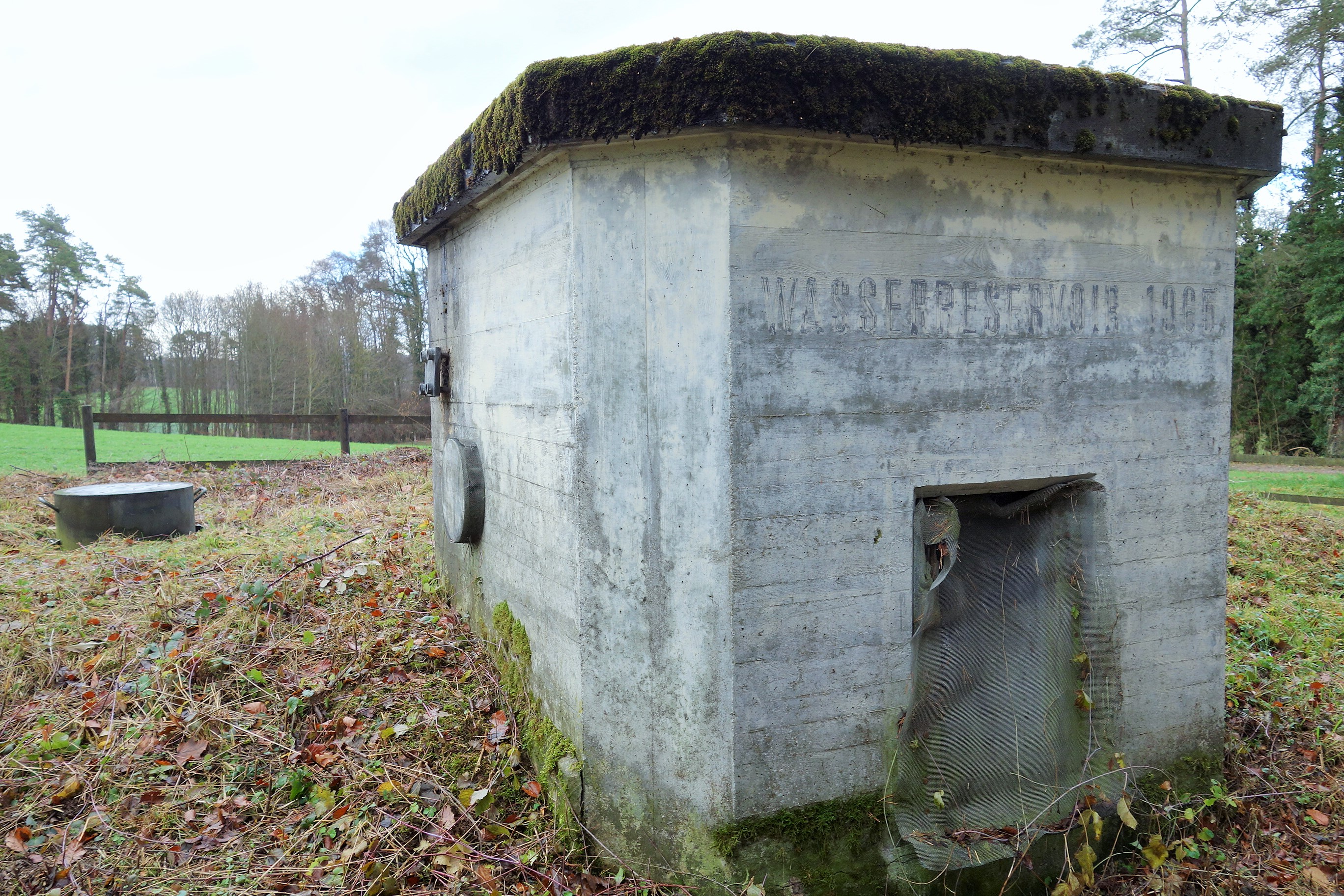 Sperrstelle Stammheim-Schlattingen, Schweiz